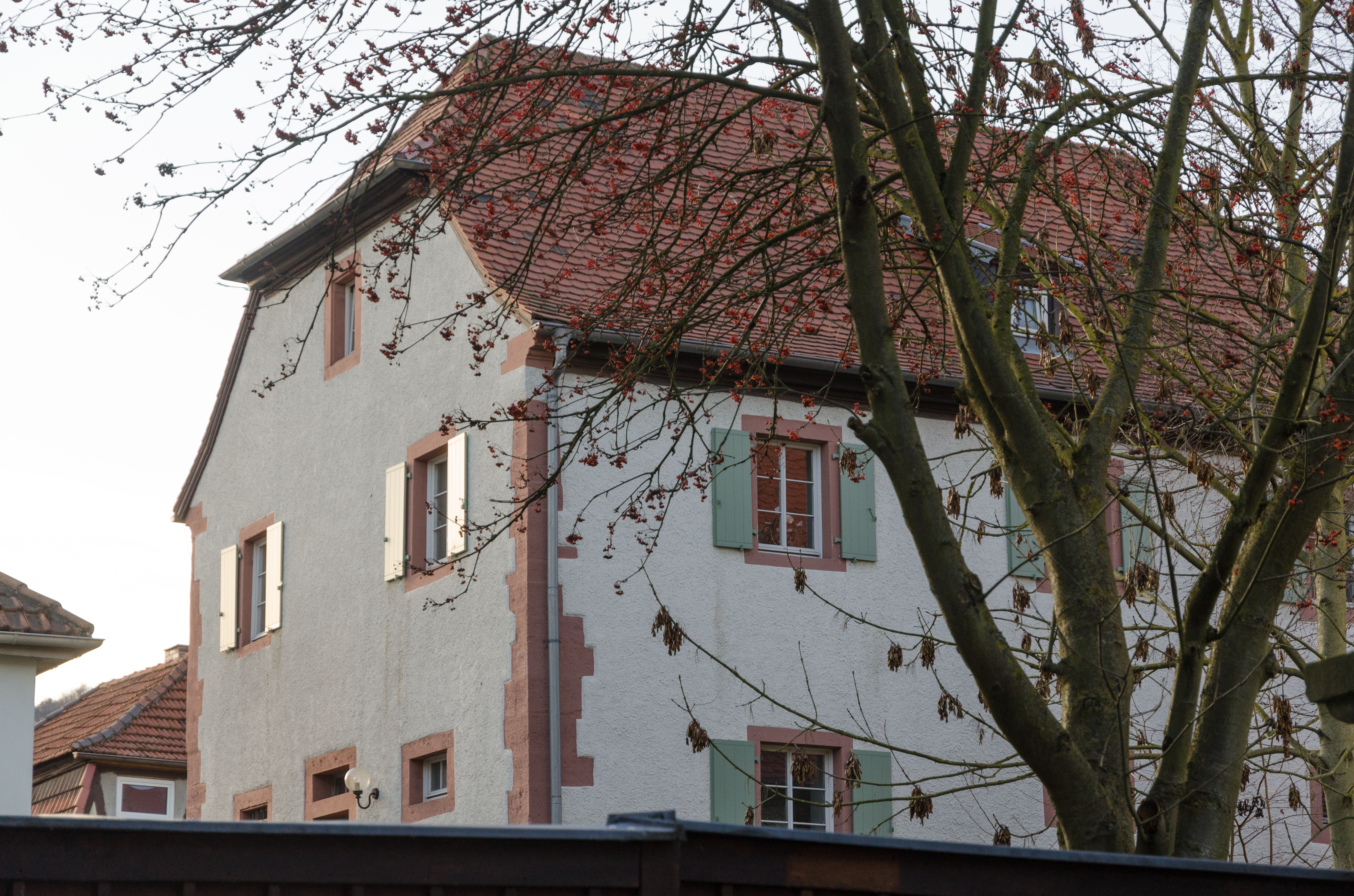 Euerdorf, Gerichtsgasse 3, Nebengebäude